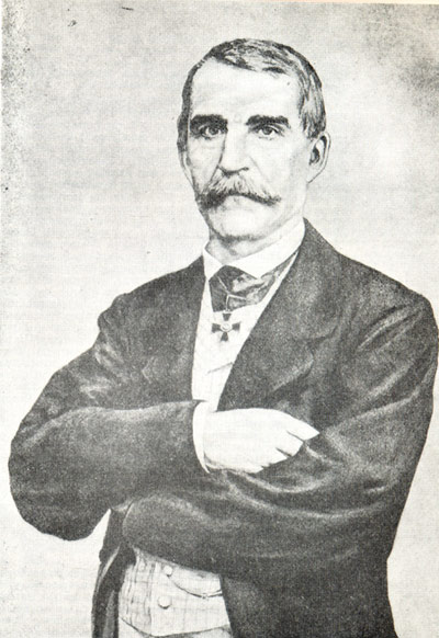 Божидар Петрановић српски историчар и правник.